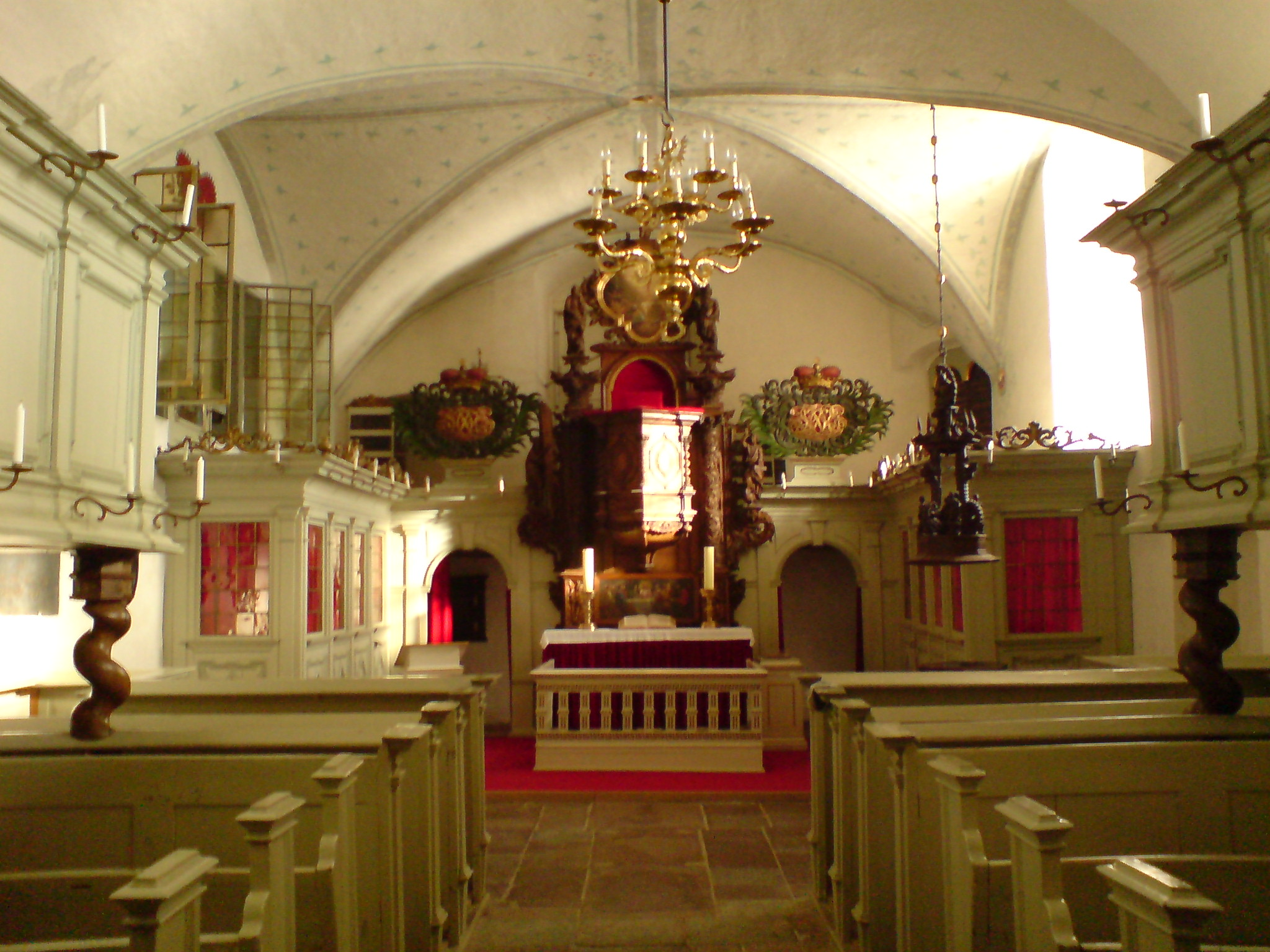 Description=Schlosskapelle Glücksburg Source=myself Date=03.2008 Author=PodracerHH 20:12, 2 March 2008 (UTC)